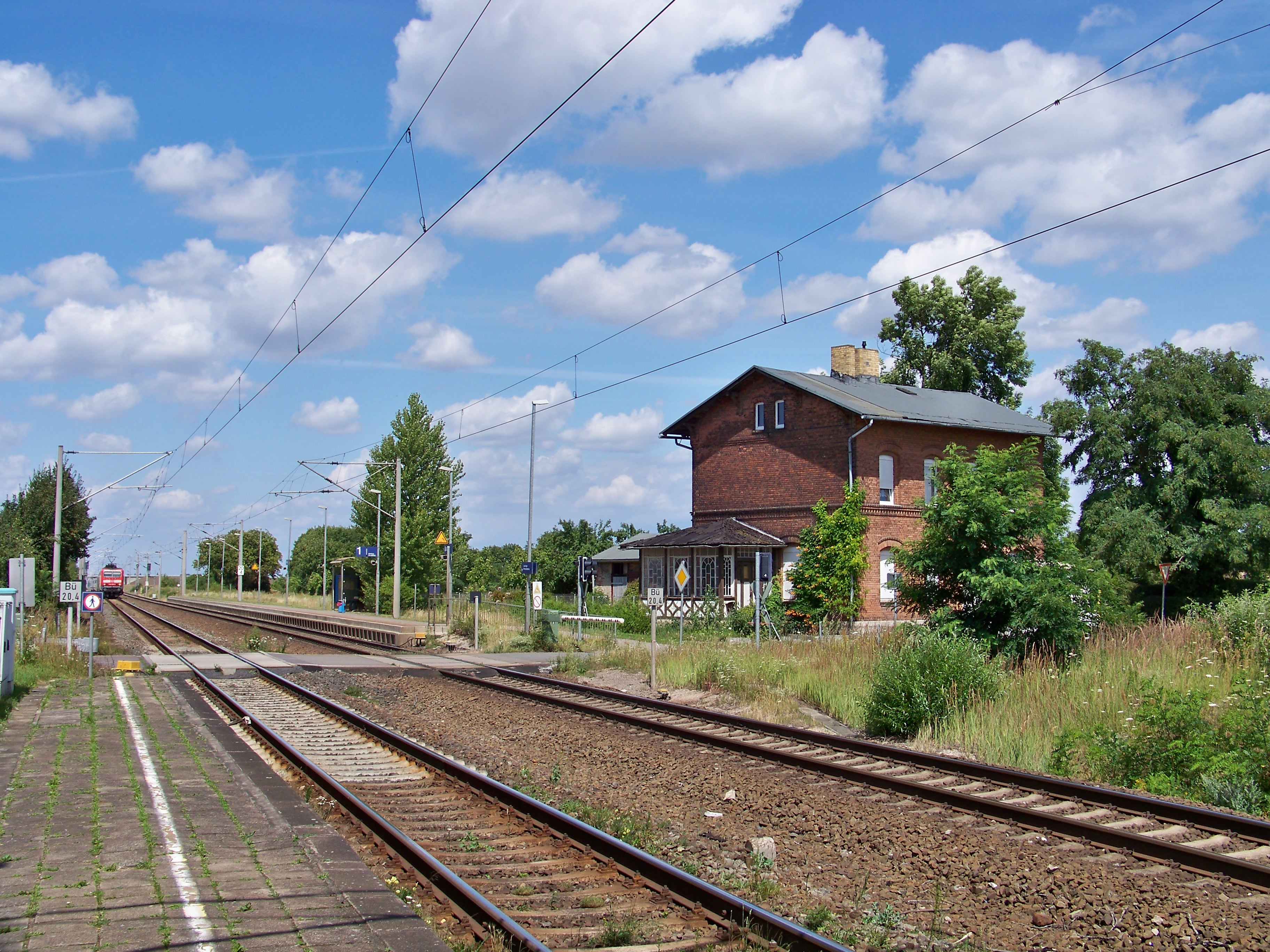 Haltepunkte in Gnadau bei Schönebeck (Elbe)